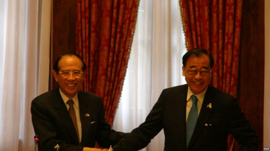 中文（中国大陆）: 亚东关系协会会长廖了以（右）与交流协会会长大桥光夫（左）签署台日渔业协议。